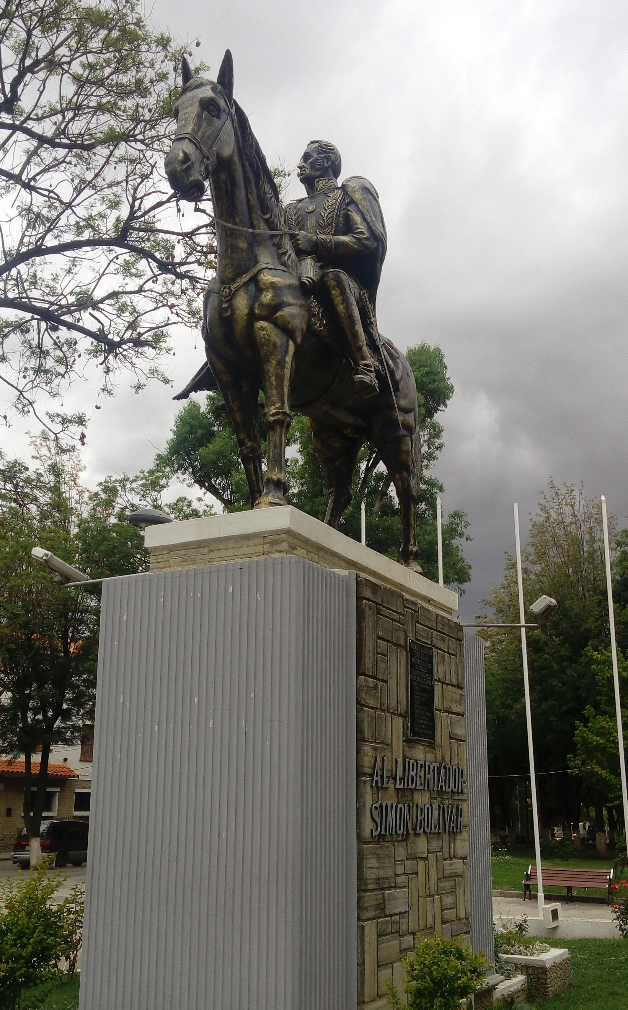 Monument für Simón Bolívar, "El Libertador", in der Promenade Parque Bolívar im Zentrum der Stadt Tarija, Bolivien